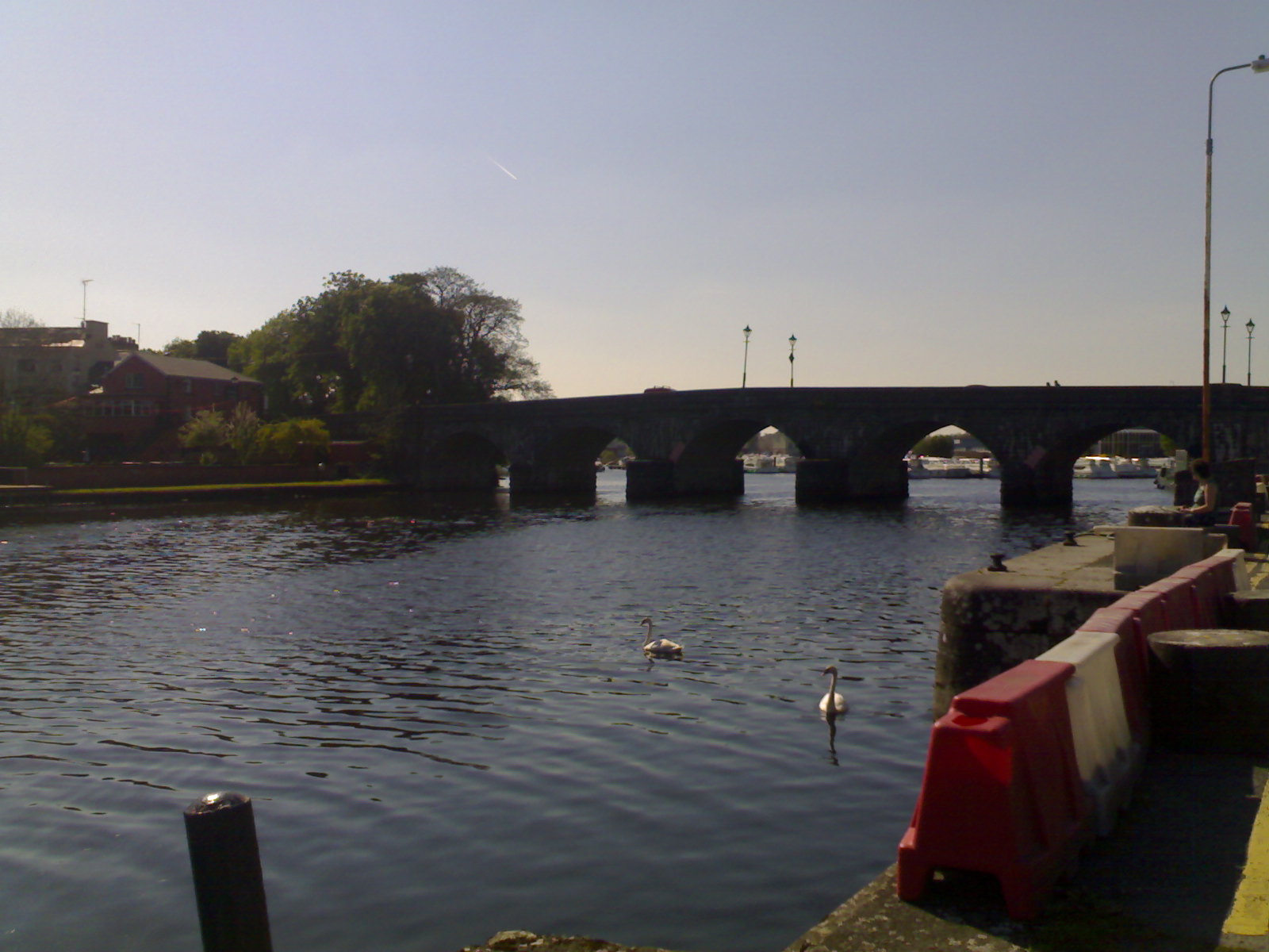 le_pont_Carraick-on-Shannon.jpg